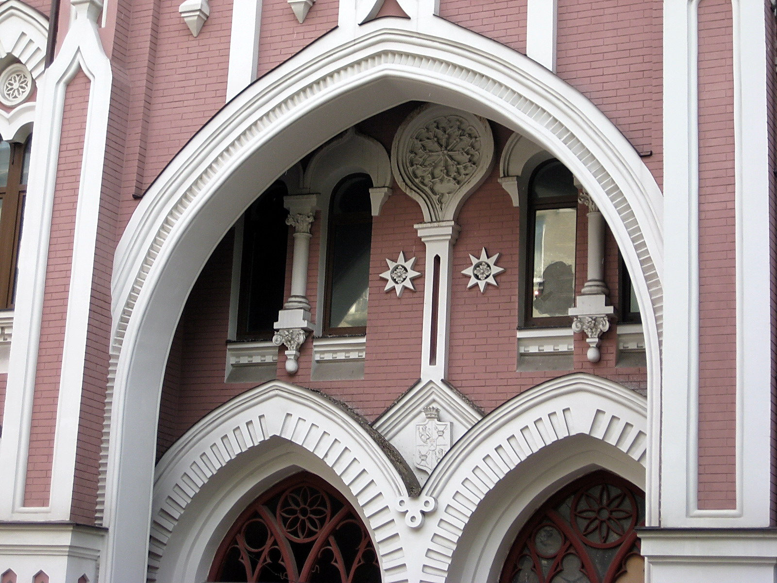 Будинок прибутковий, Київ, Шовковична вул., 19